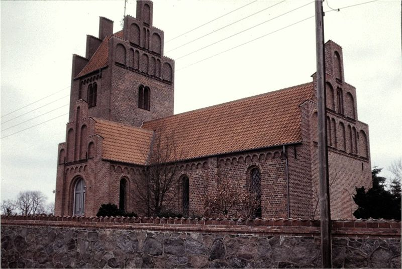 Vester Egede Kirke i Danmark. Vester Egede kirke